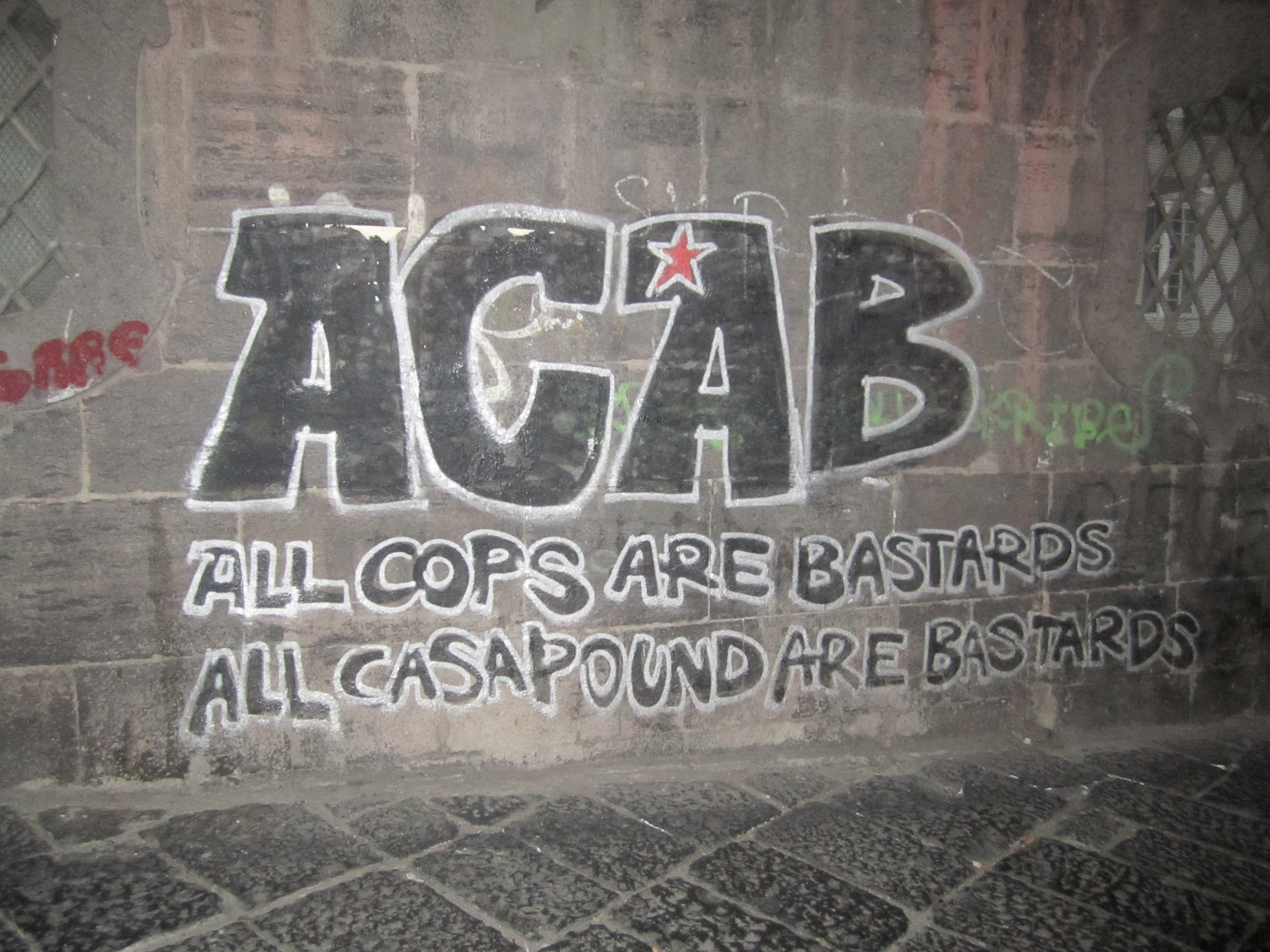 ACAB